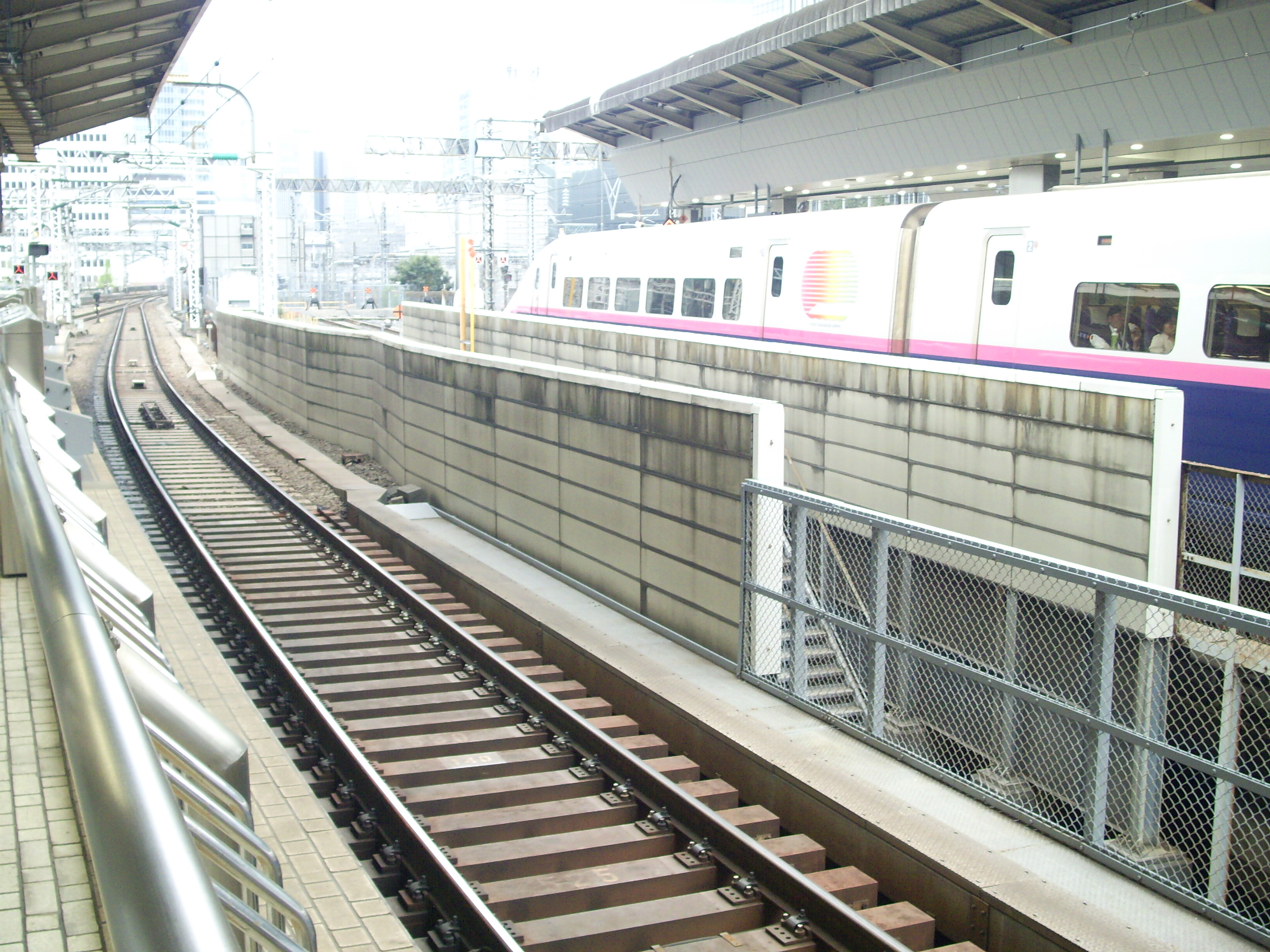 東京駅のJR東海（東海道新幹線）とJR東日本（東北新幹線）との間にある鉄道無線混線防止用の電磁シールド（RF遮蔽壁） ㊟カメラを起動すると日付機能が出荷時のものに初期化されるため、ファイル履歴の撮影日時とメタデータの原画像データの生成日時が異なります